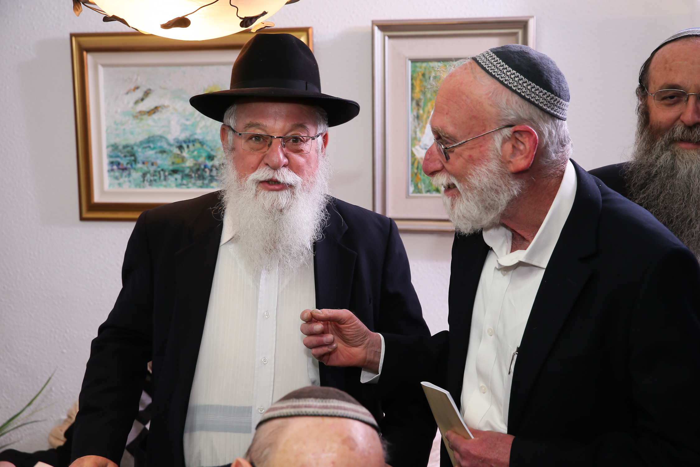 הרב מרדכי גרינברג בהכנסת ספר תורה בישיבת מרכז הרב יחד עם הרב יהושע בן מאיר.